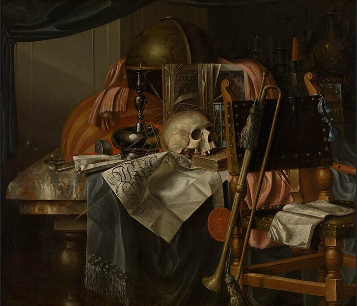 Still Life